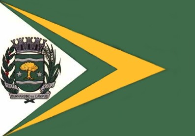 Bandeira de Bernardino de Campos